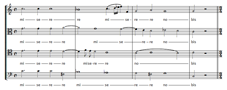 "Miserere Nobis", de l'Agnus Dei de la "Missa Salisburgensis" de Heinrich Ignaz Franz von Biber